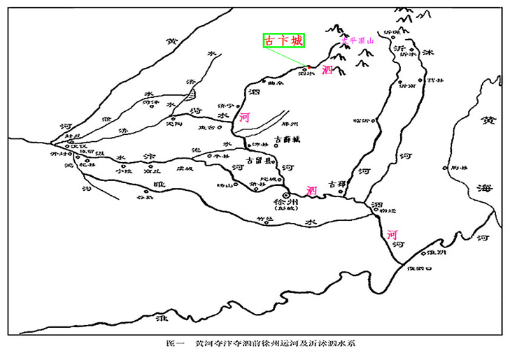 localisation gisement pierre stone needle